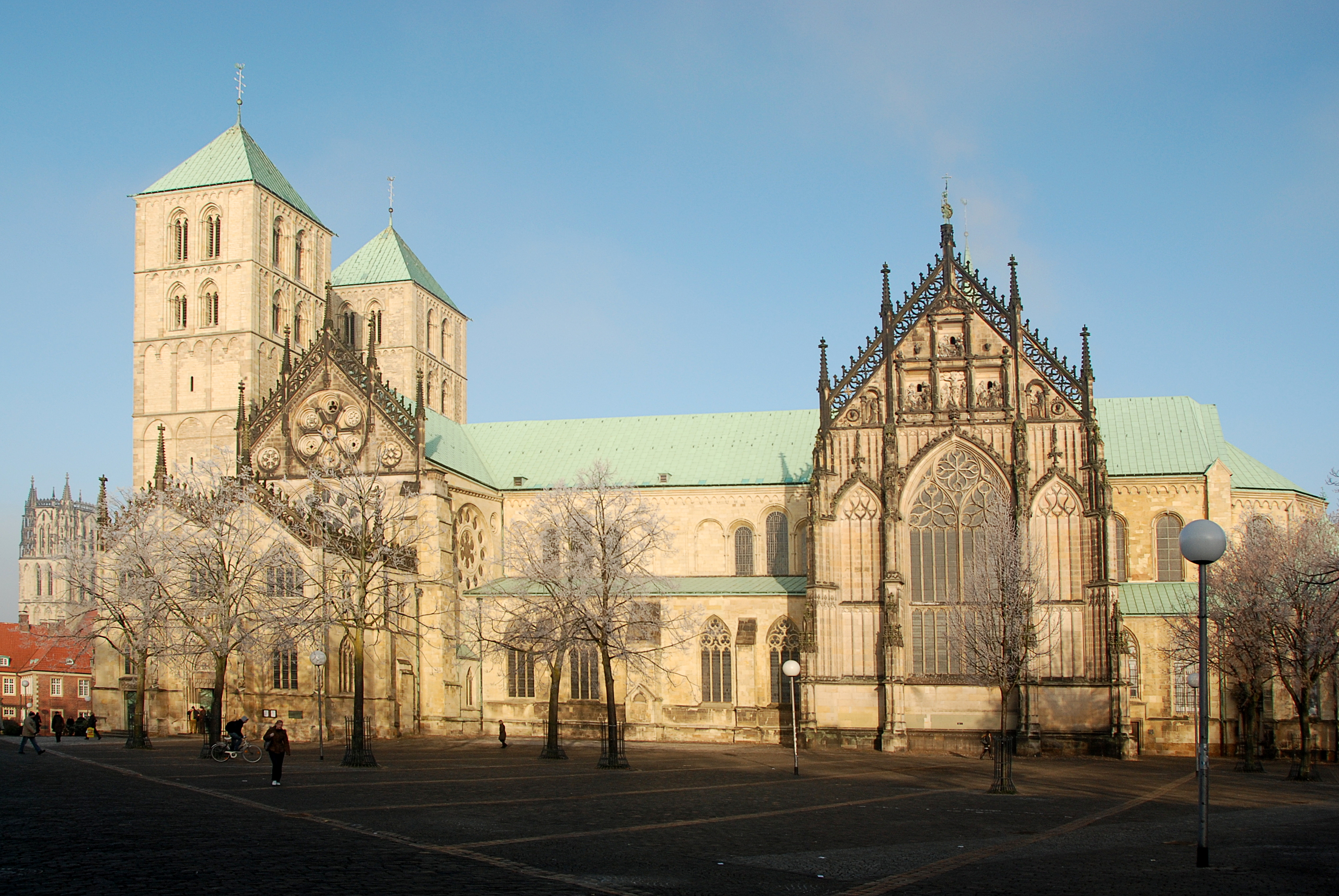 St.-Paulus-Dom. Location: Münster, NRW, Germany